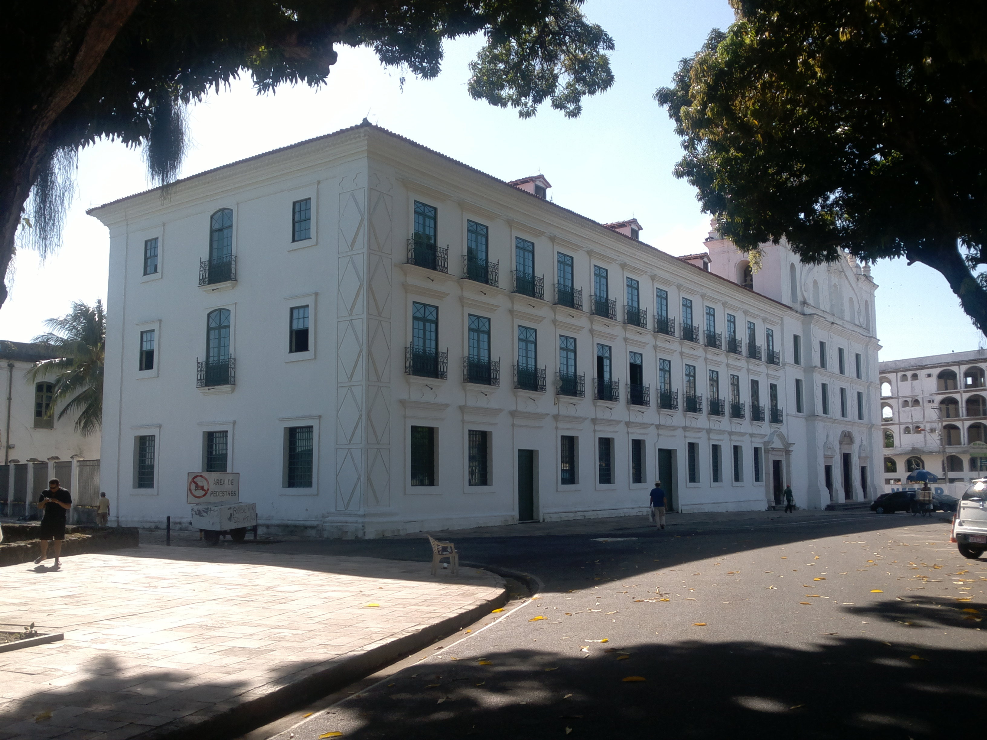 Igreja de Santo Alexandre e antigo Colégio dos Jesuítas em Belém do Pará. Foto tirada por João Paulo B. Brito em 22 de Junho de 2013